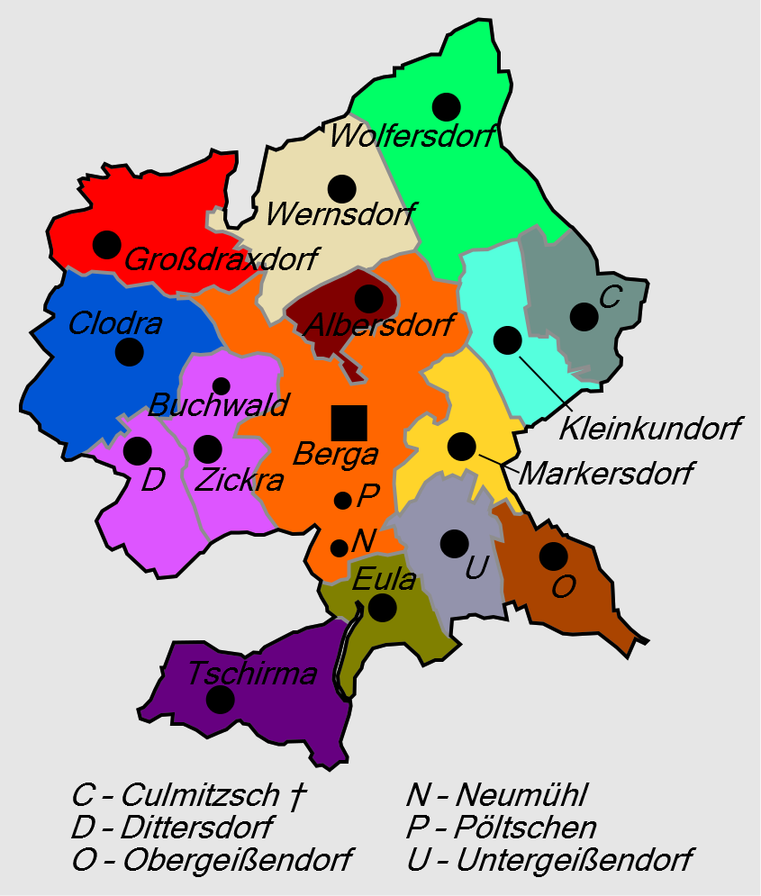 Gliederung der Stadt Berga/Elster ab 1. Juli 1950